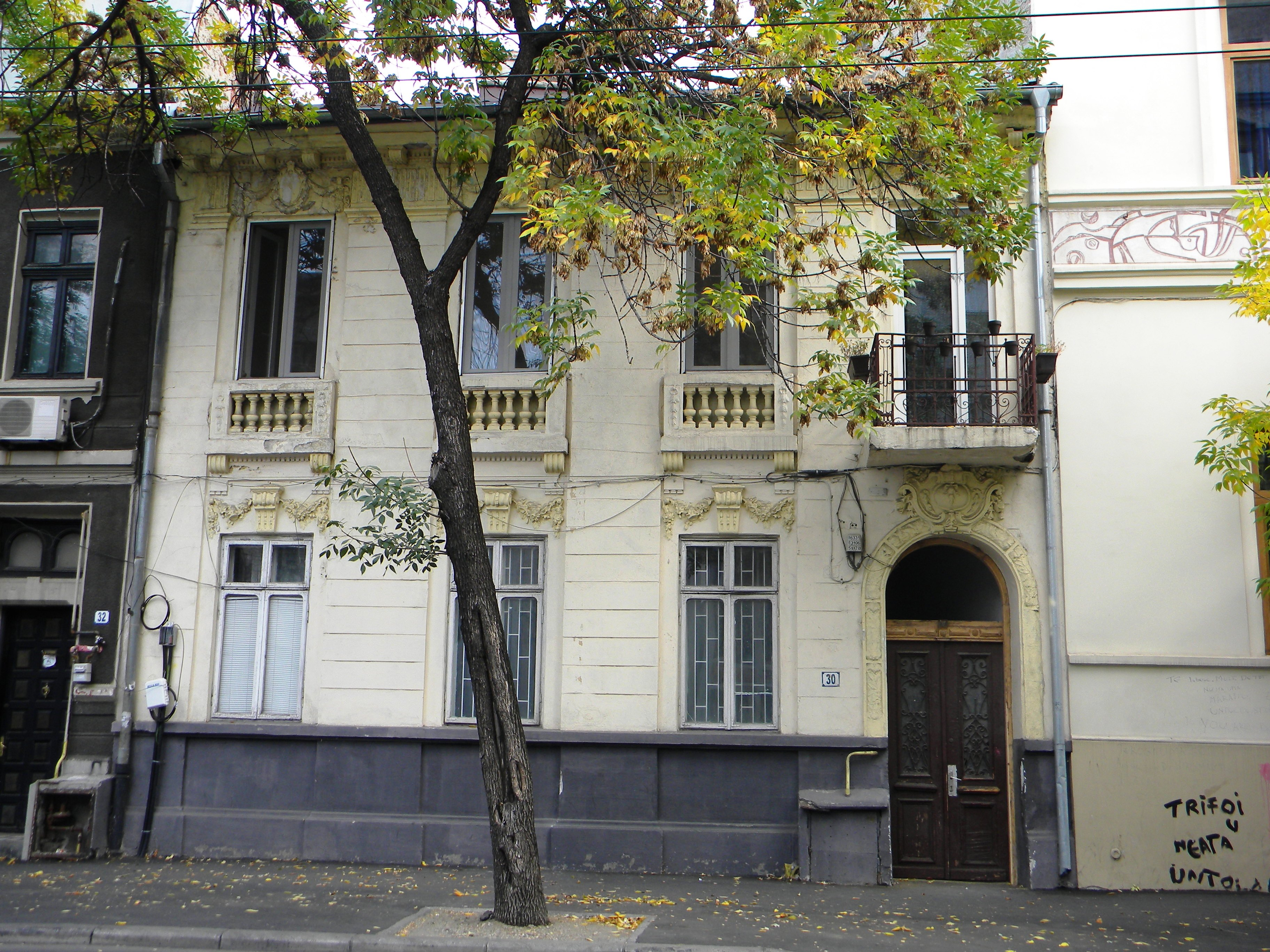 Bucuresti, Romania,Casa pe Calea Grivitei nr. 30, sect. 1